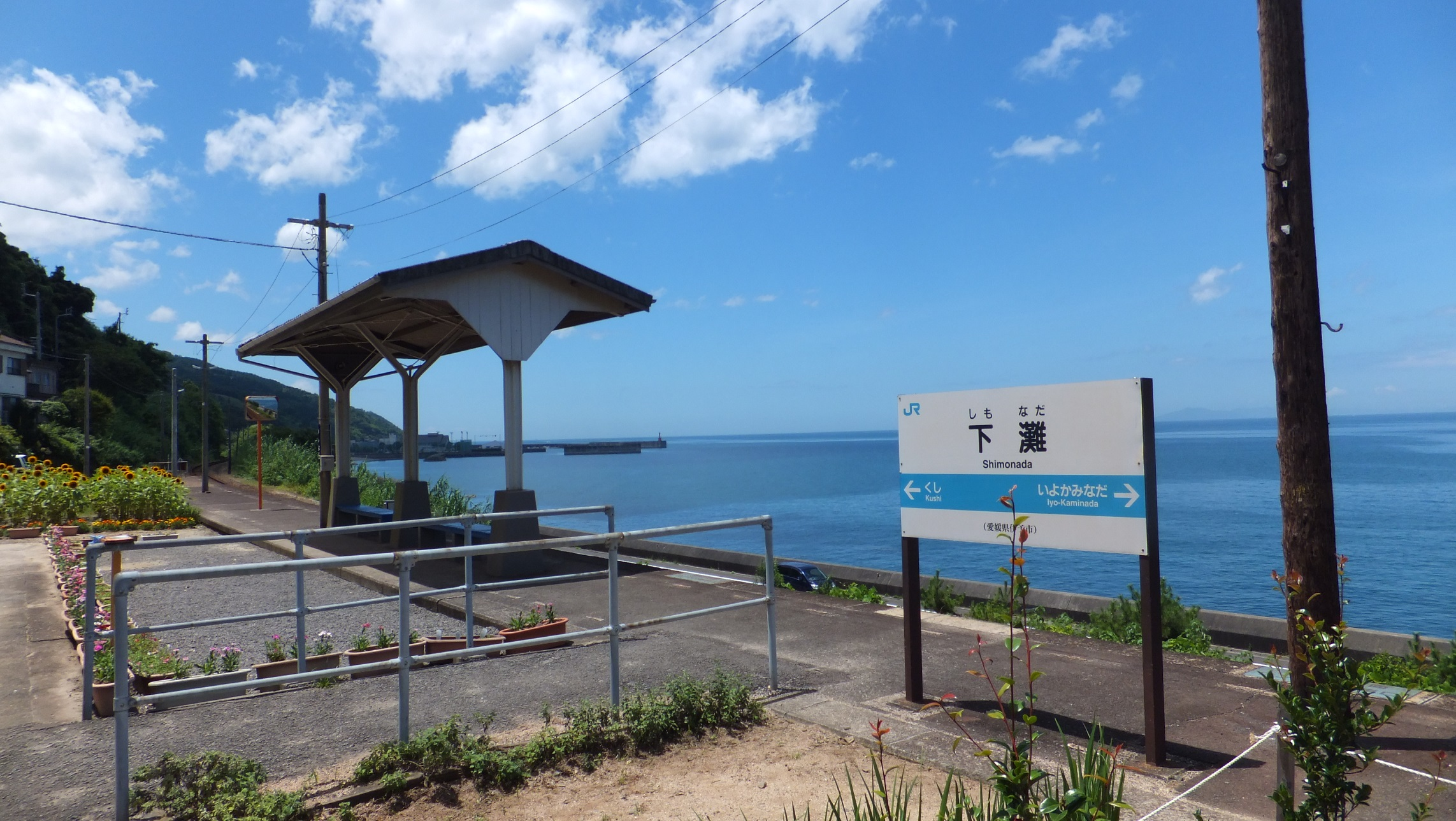 愛媛県伊予市 下灘駅 2015年7月